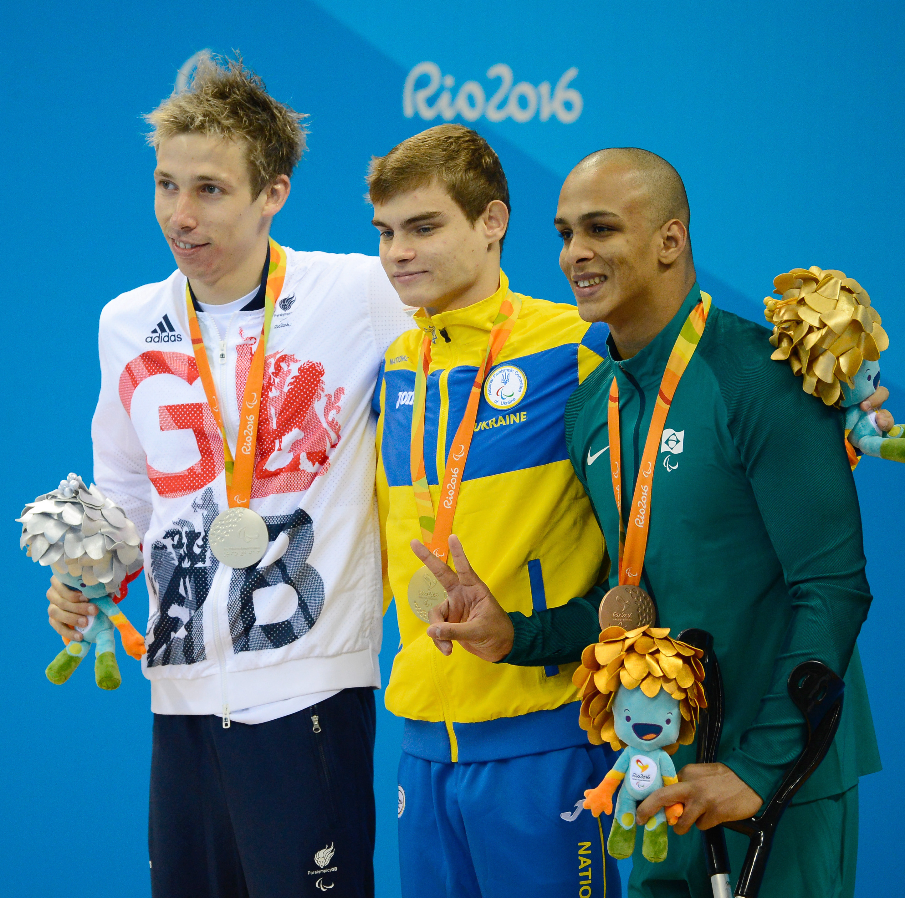 Rio de Janeiro - Brasileiro Italo Pereira ganha medalha de bronze nos 100m nado costas S7 nos Jogos Paralímpicos Rio 2016, no Estádio Aquático